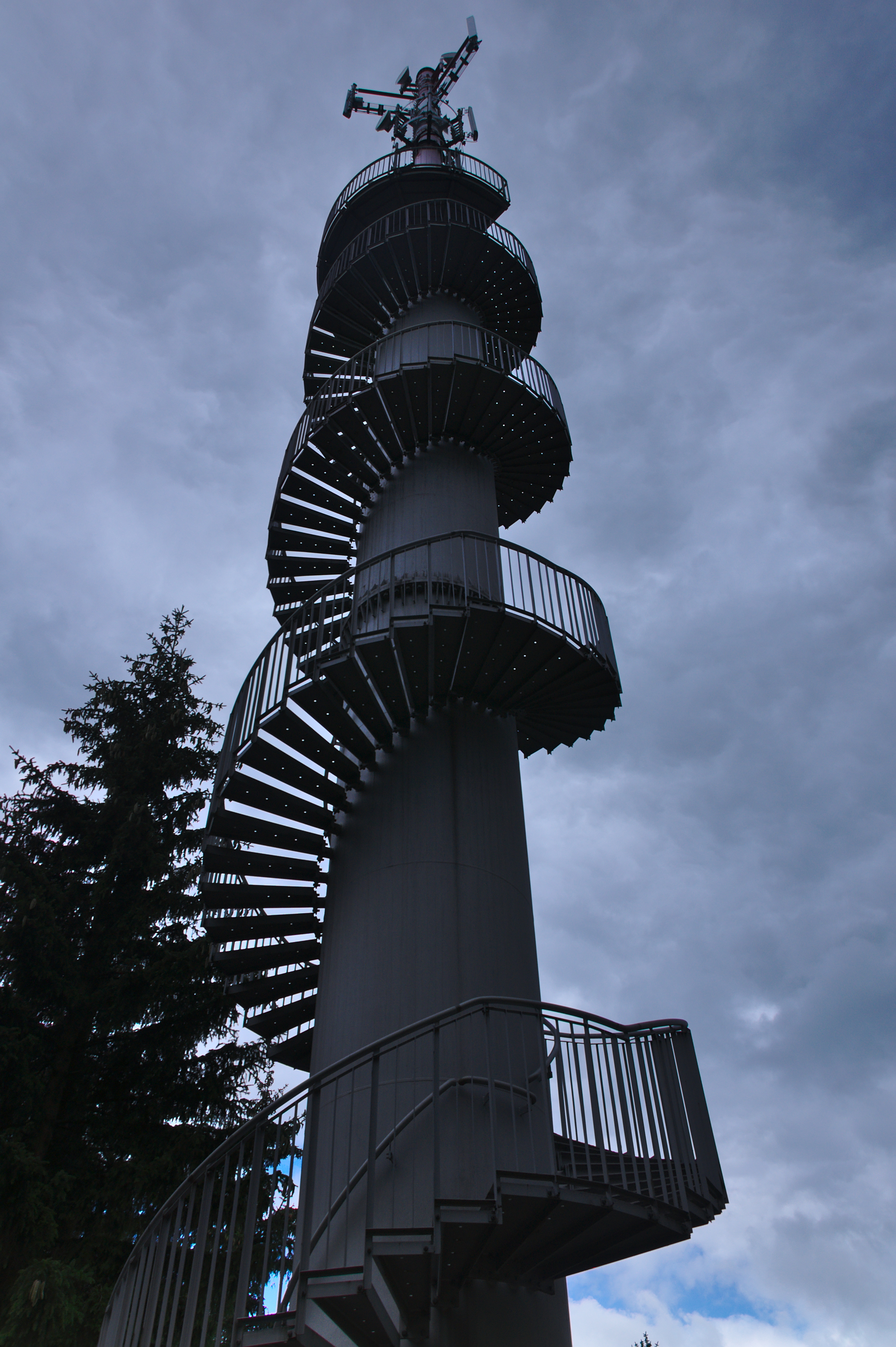 Rozhledna Babylon, Kozárov, okres Blansko